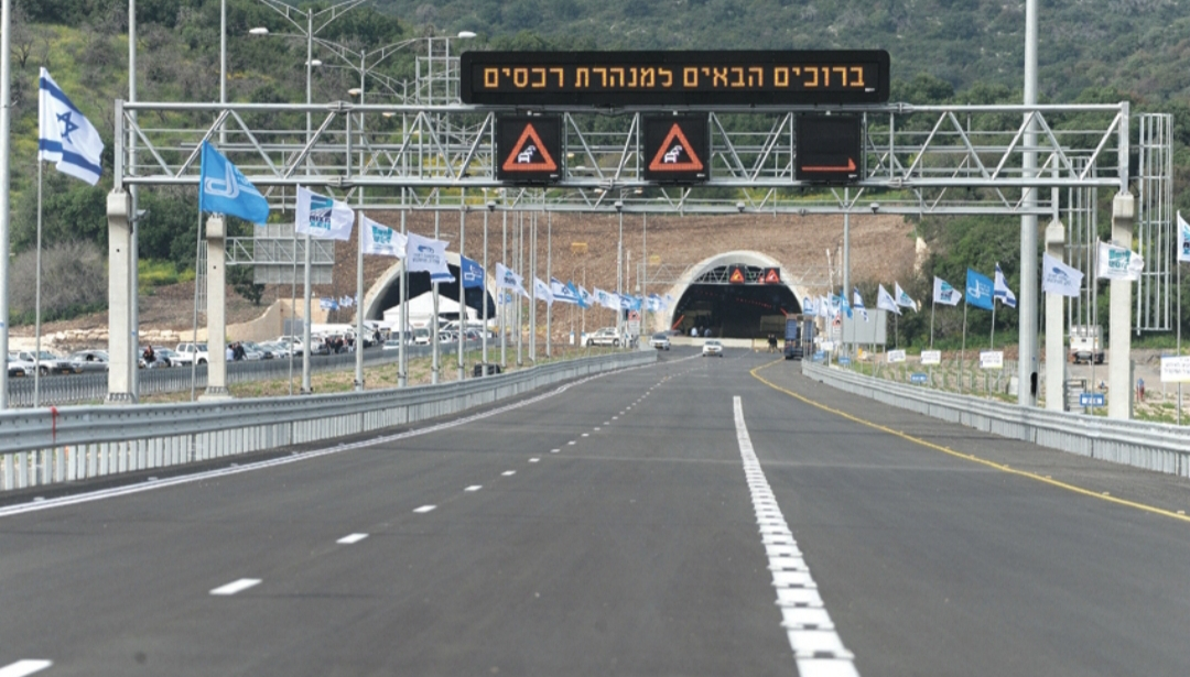 כביש 6